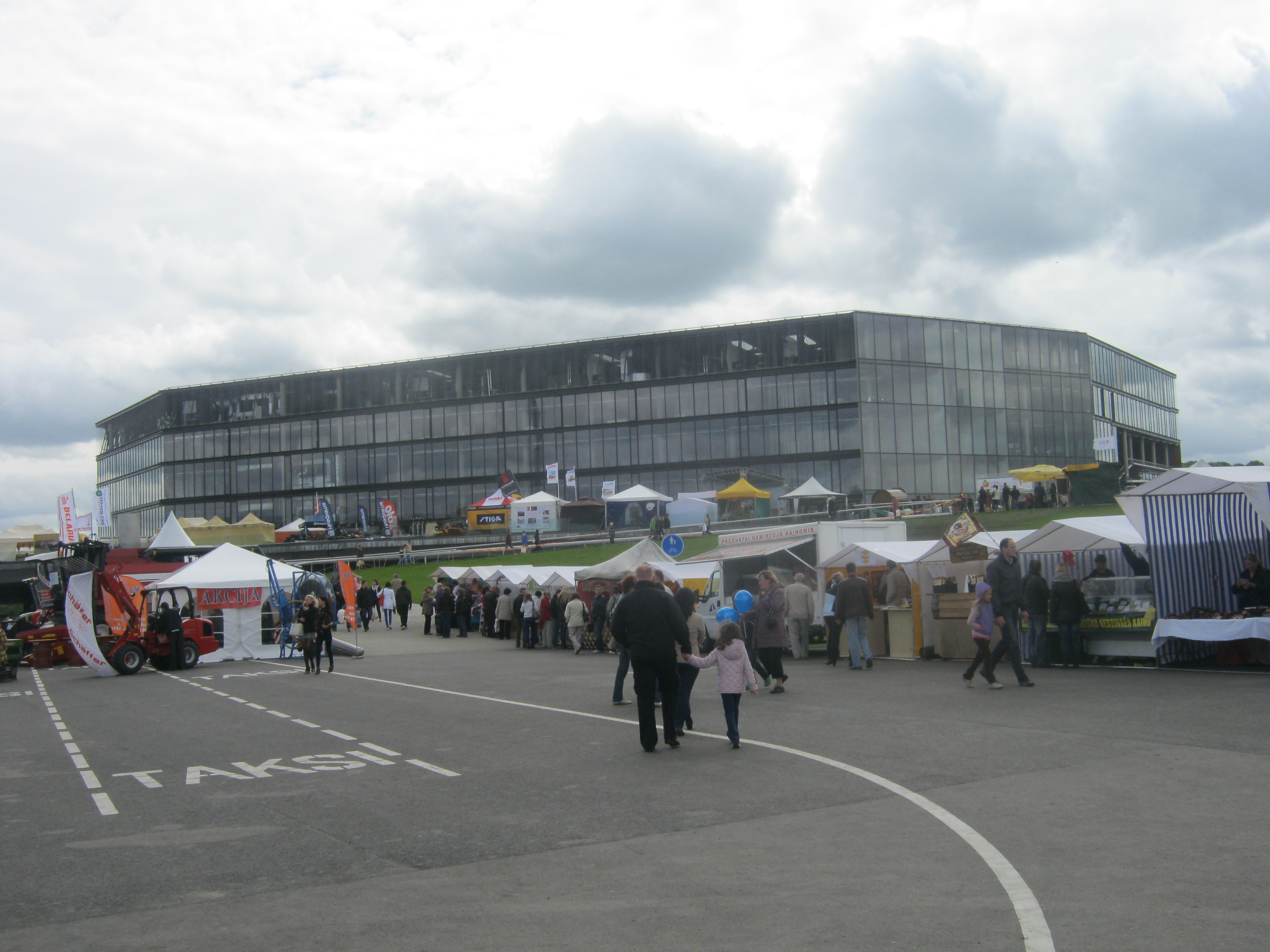 AgroBalt 2012